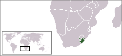 Description:Carte de localisation du Transkei, Afrique du Sud Auteur:Rémih